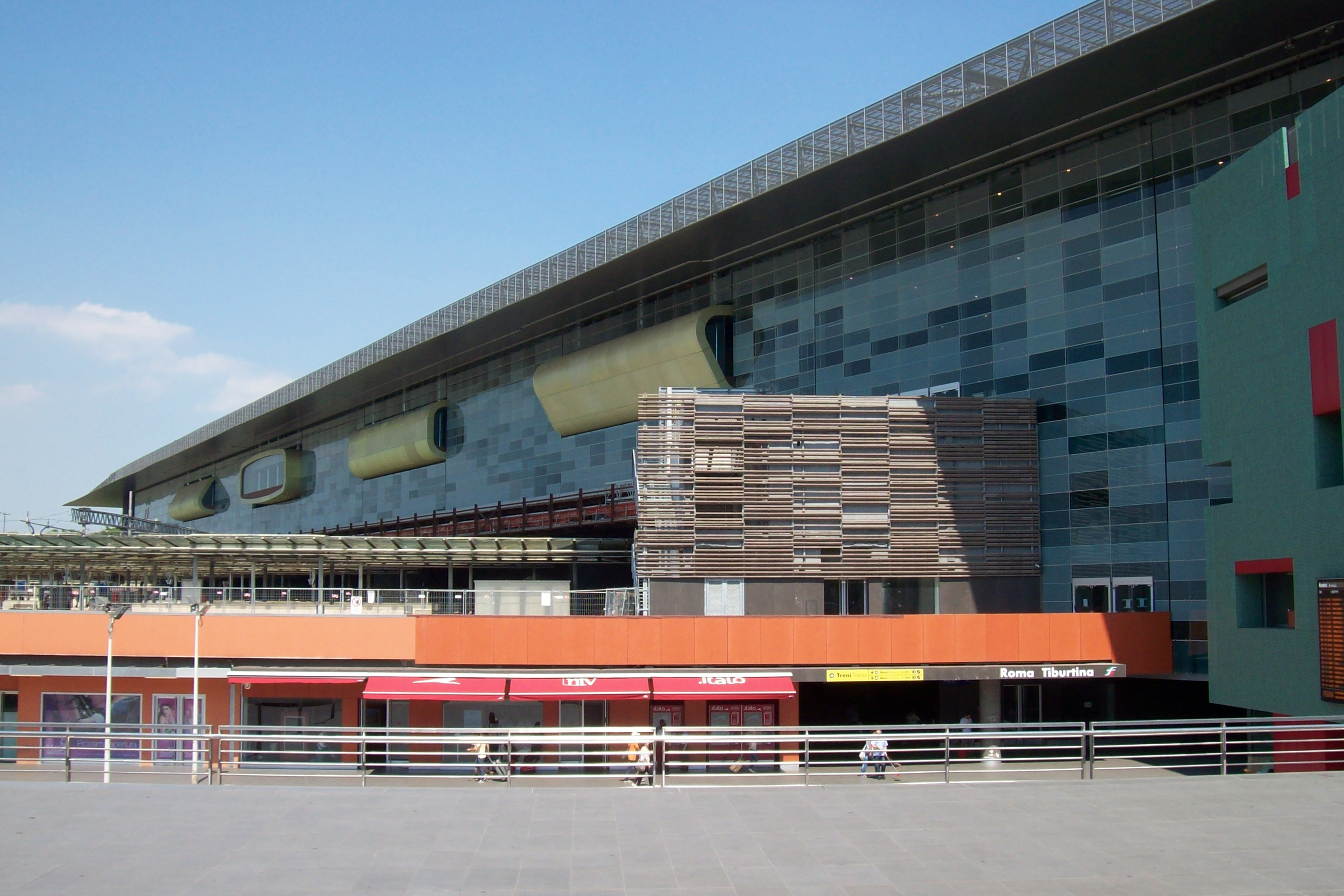 Roma Tiburtina train station